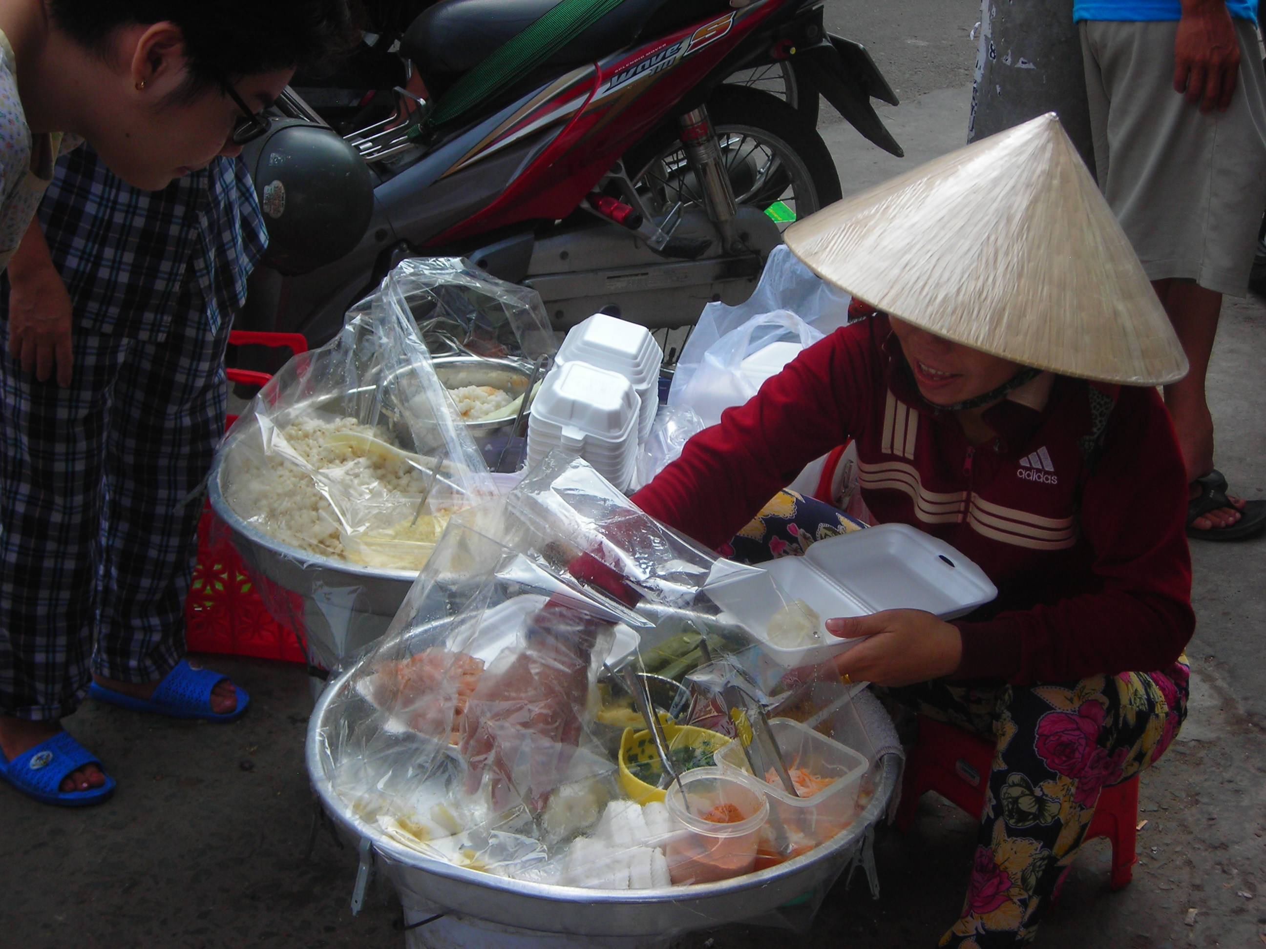 Vendeuse ambulante des bánhs